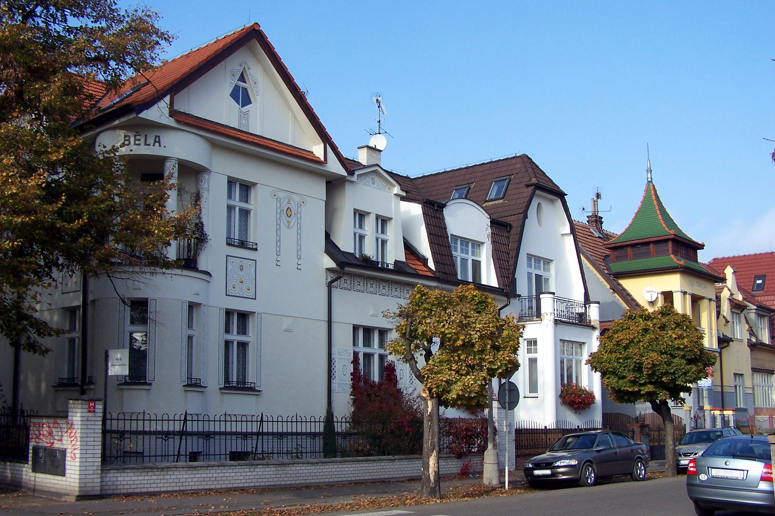 Secesní vilky v Poděbradech